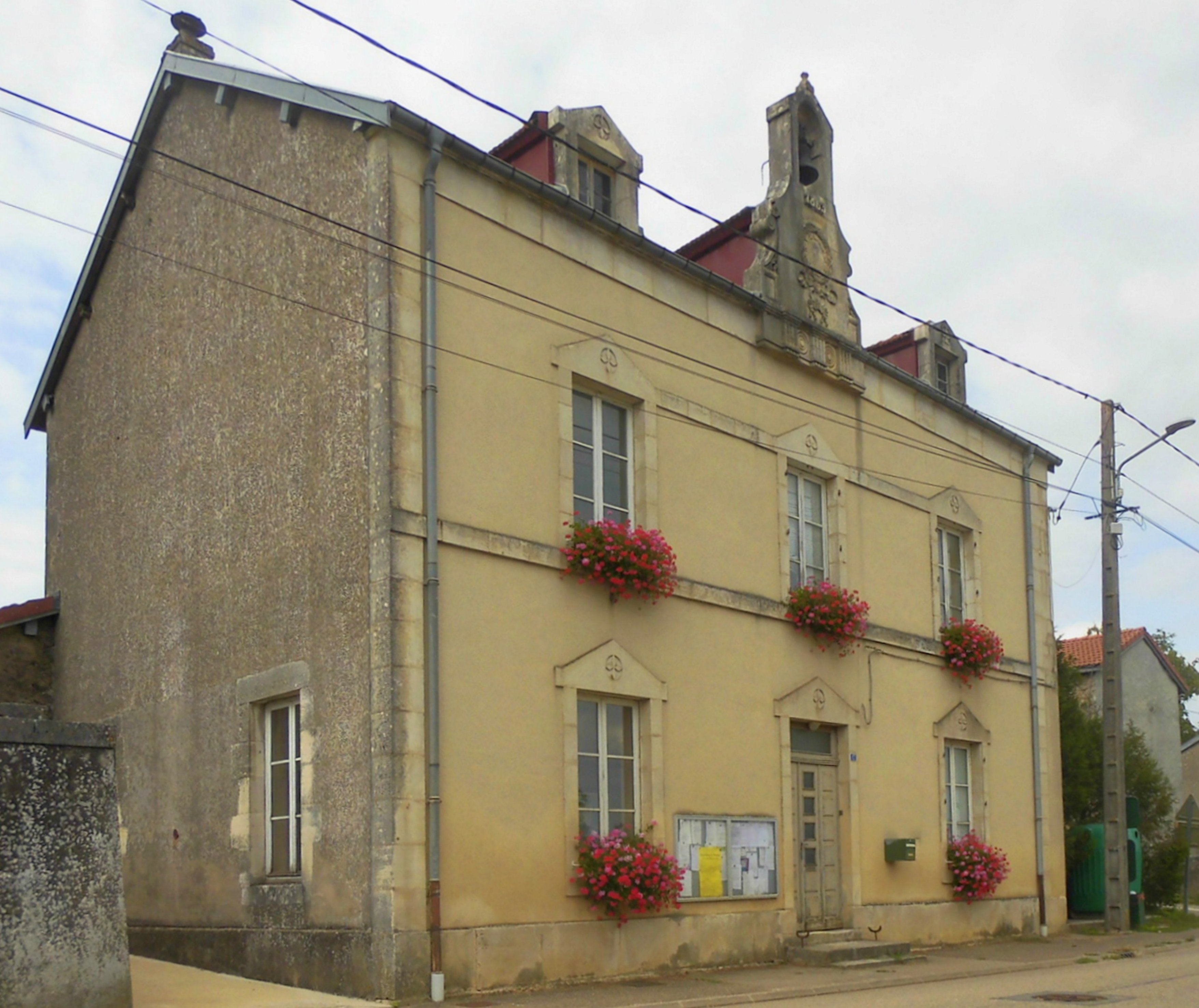 La mairie de Tranqueville-Graux